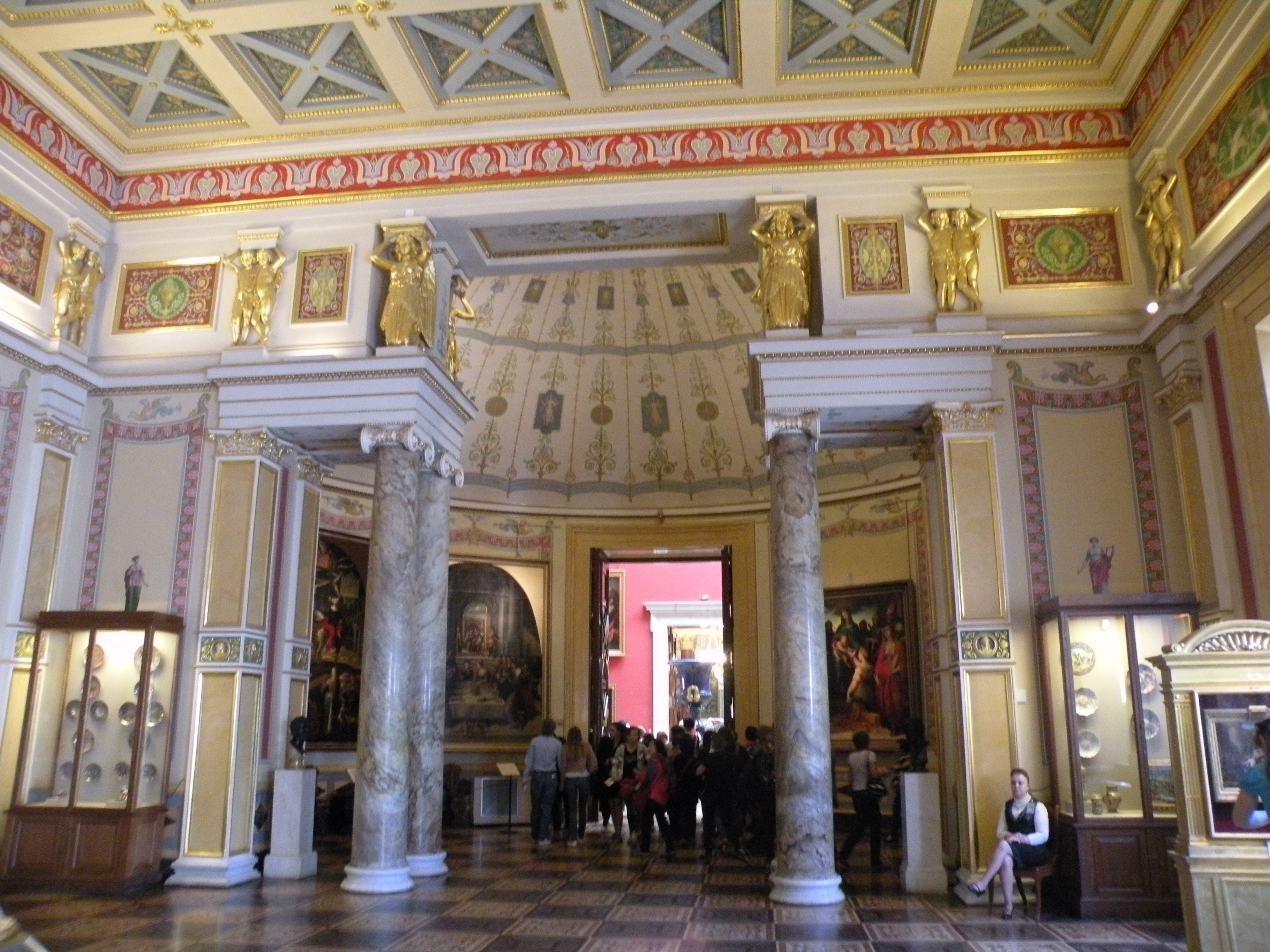 Majolica Room